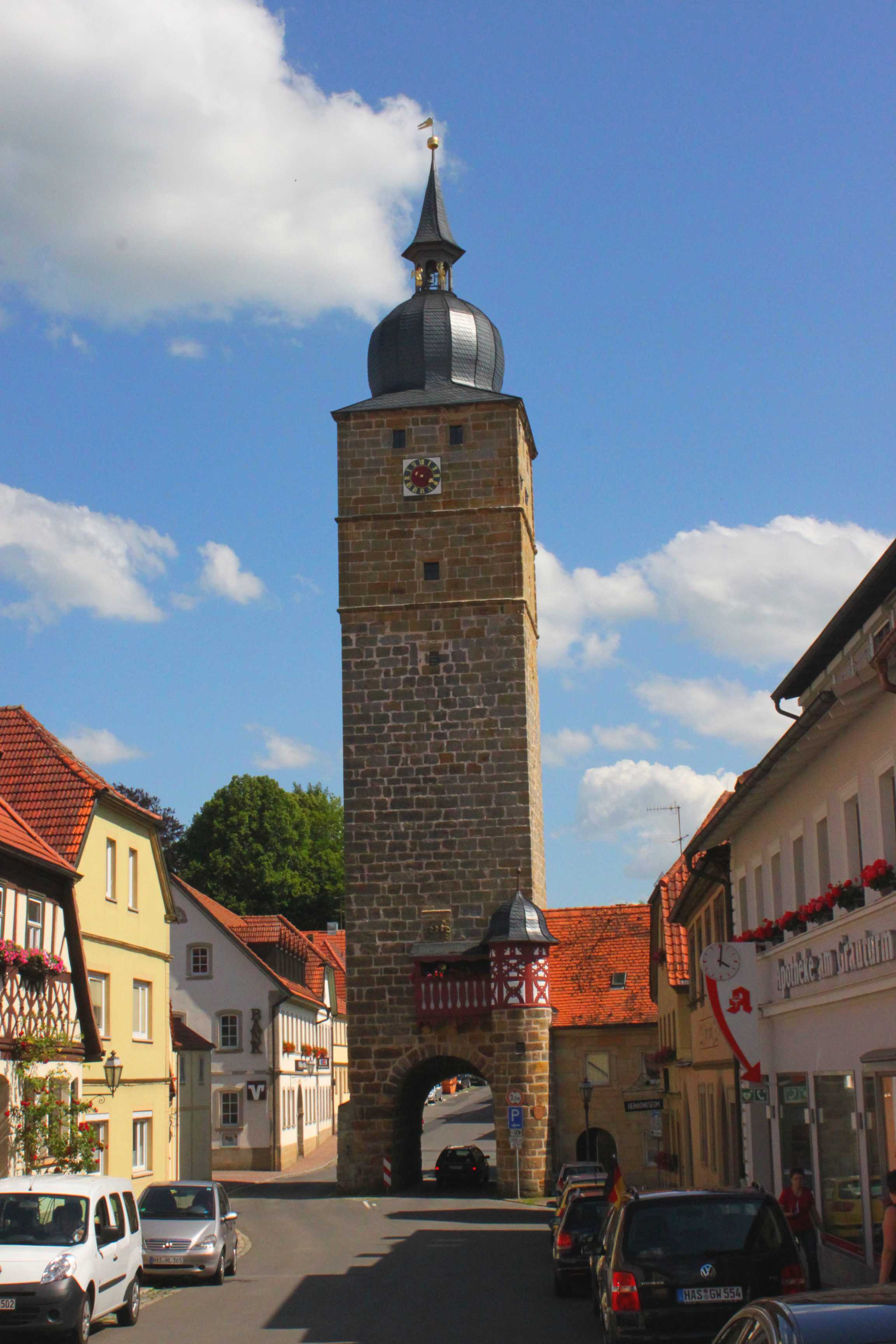 Der Grauturm ist das Wahrzeichen der Stadt Ebern